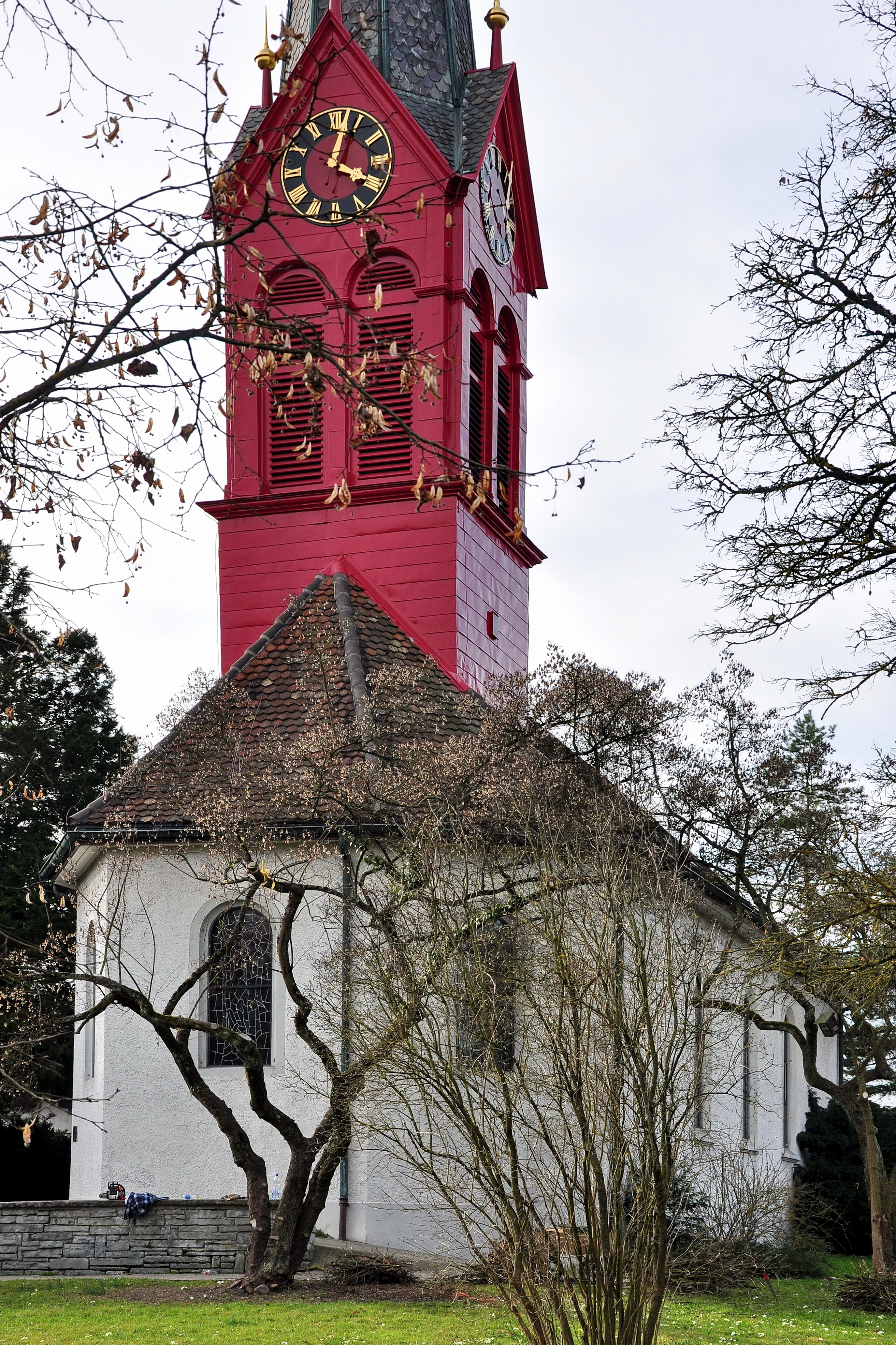 Reformierte Kirche in Zürich-Schwamendingen (Switzerland)